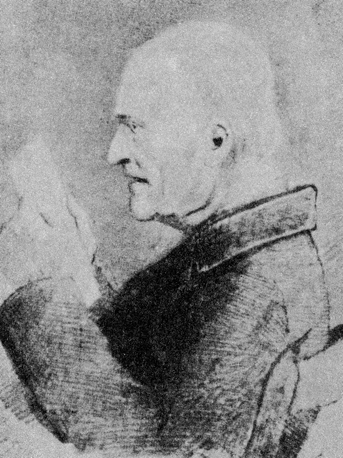 De Jean Engling, Zeechnung vum Charles Arendt: Kanonikus Johann Engling (1801-1888) (Nach dem Leben gezeichnet)